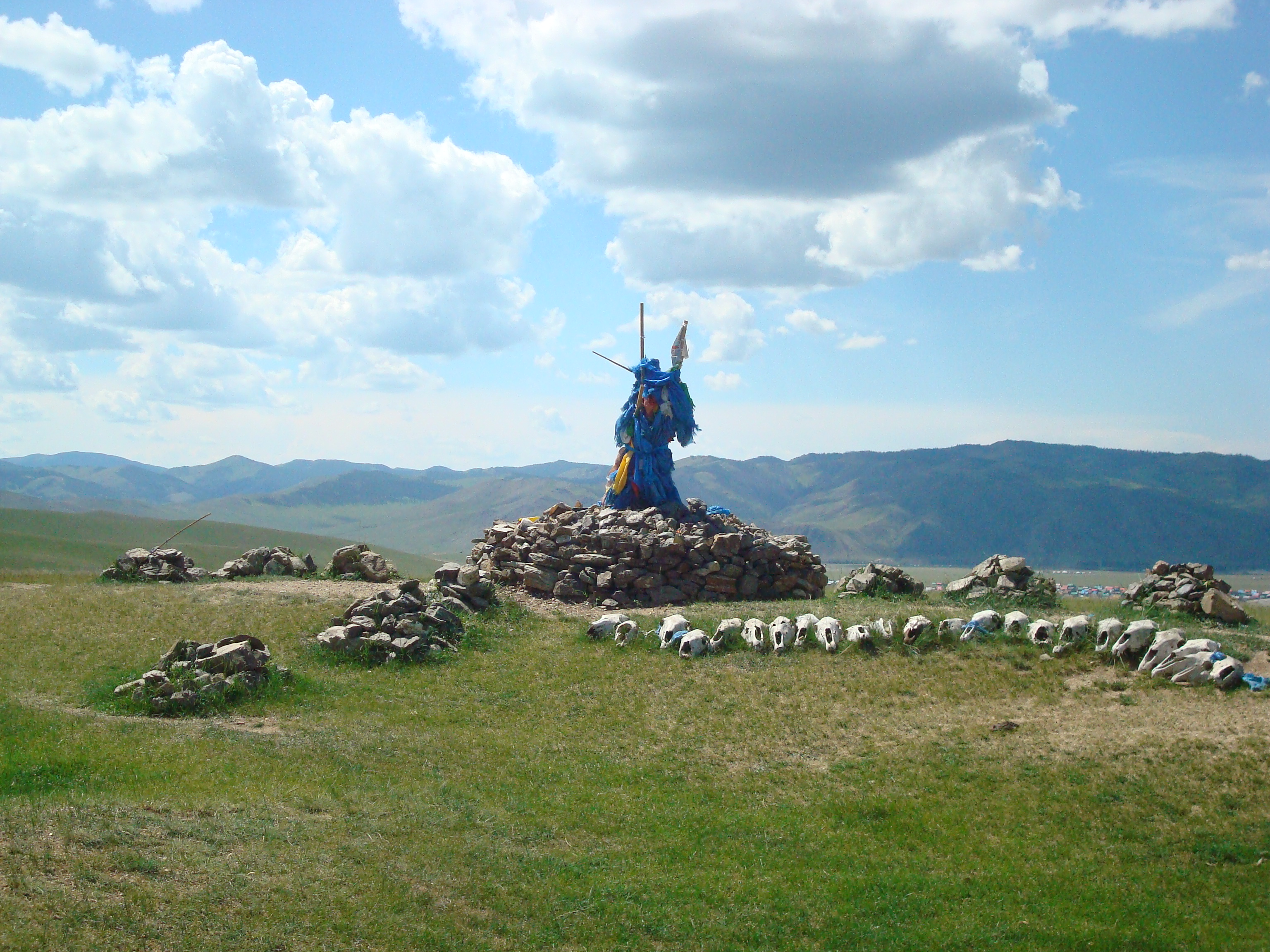 In Karakorum